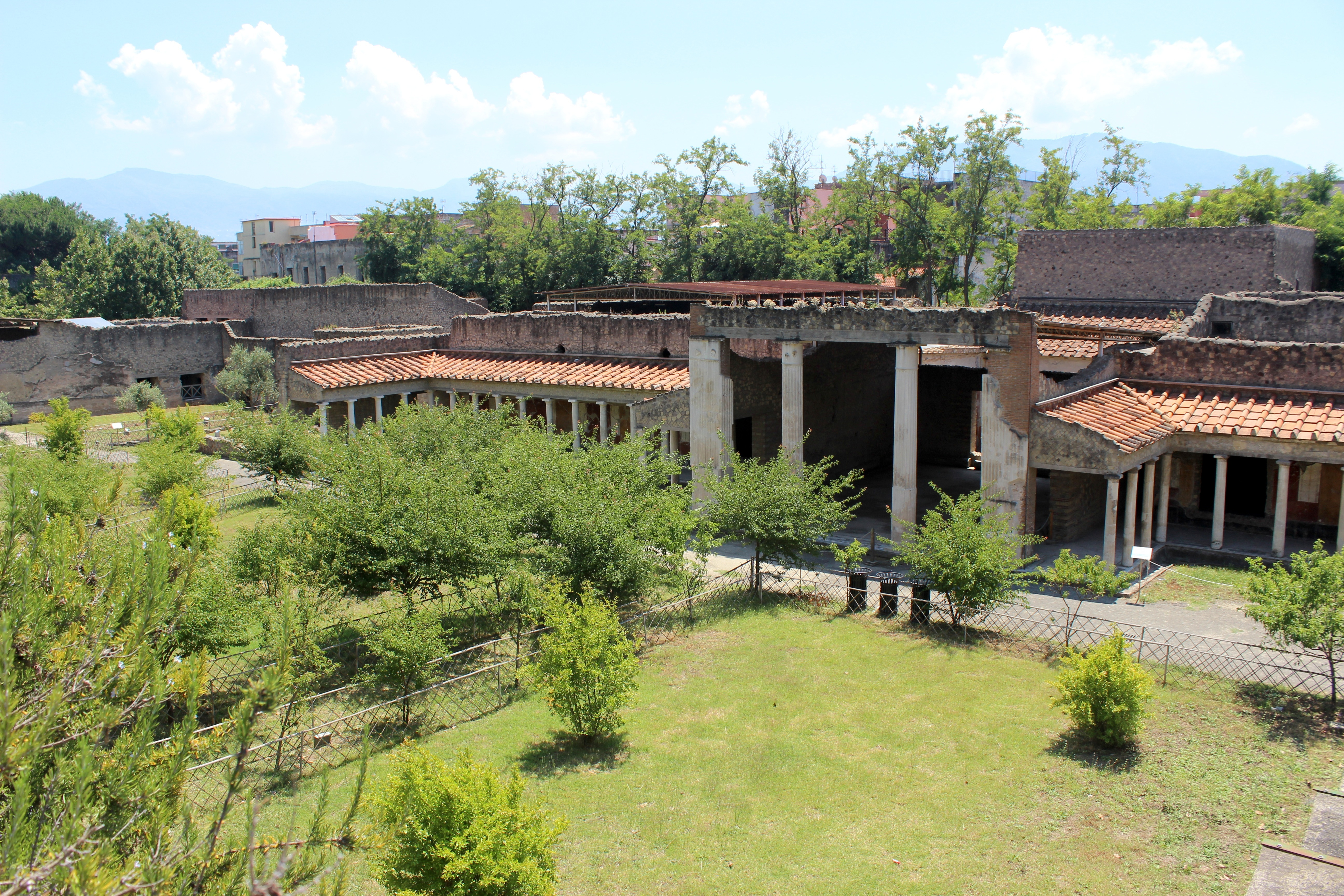 Villa Poppaea. Jardín posterior.